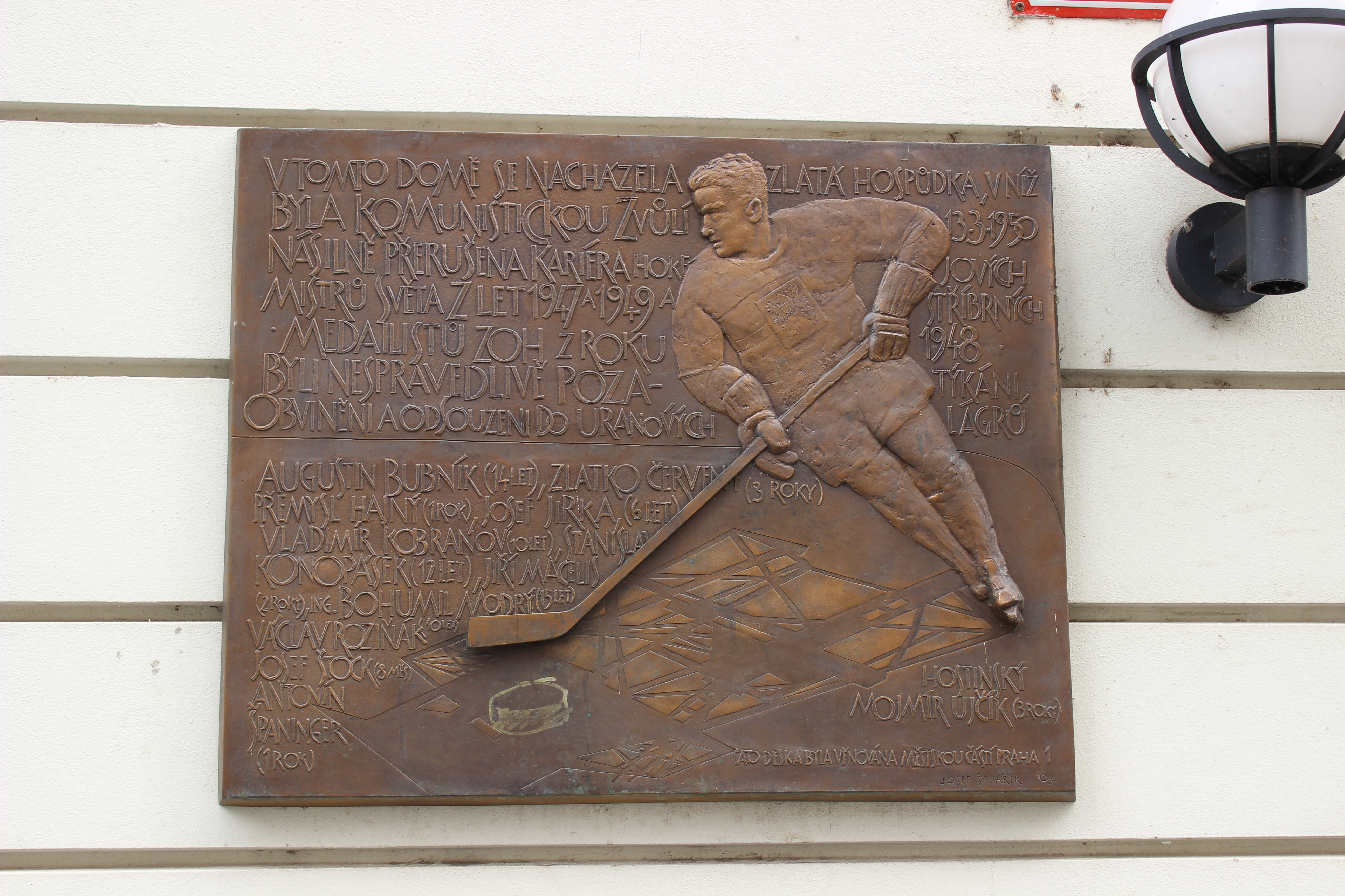 Tabule na domě v pražské Pštrossově ulici číslo 194/28, v němž bývala restaurace U Herclíků, ve které byli 13. března 1950 zatčení českoslovenští hokejisté.